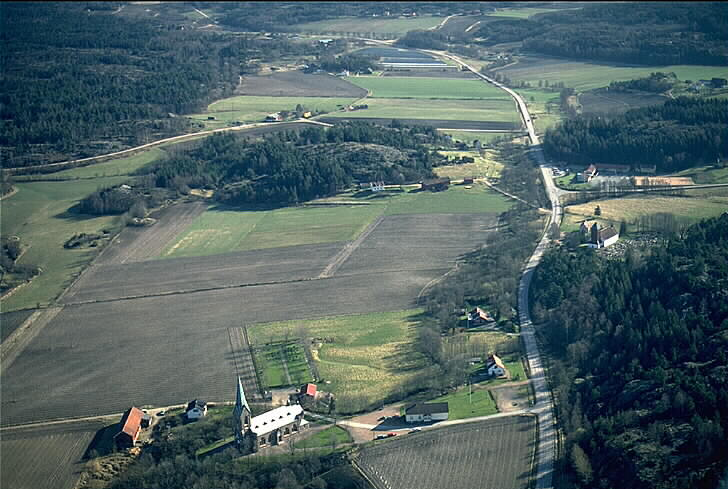 Bokenäs nya kyrka, till vänster (UDDEVALLA BÖN 1:15 - husnr 3 ) Bokenäs gamla kyrka, till höger (UDDEVALLA BOKENÄS GAMLA KYRKA 1:1 - husnr 1). Bilden täcker flera fornlämningar som dock inte syns, men framförallt en boplats, Sten-/Bronsålder. Motiv: Bokenäs Nyckelord: Flygbilder, Riksintressen Kategori: Miljöer, Odlingslandskap Bokenäs nya kyrka, till vänster (UDDEVALLA BÖN 1:15 - husnr 3 ) Bokenäs gamla kyrka, till höger (UDDEVALLA BOKENÄS GAMLA KYRKA 1:1 - husnr 1). Bilden täcker flera fornlämningar som dock inte syns, men framförallt en boplats, Sten-/Bronsålder.